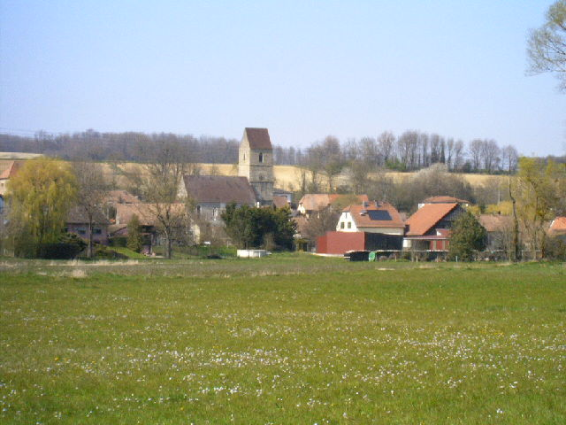 Village de Steinbrunn-le-Haut, Alsace, France